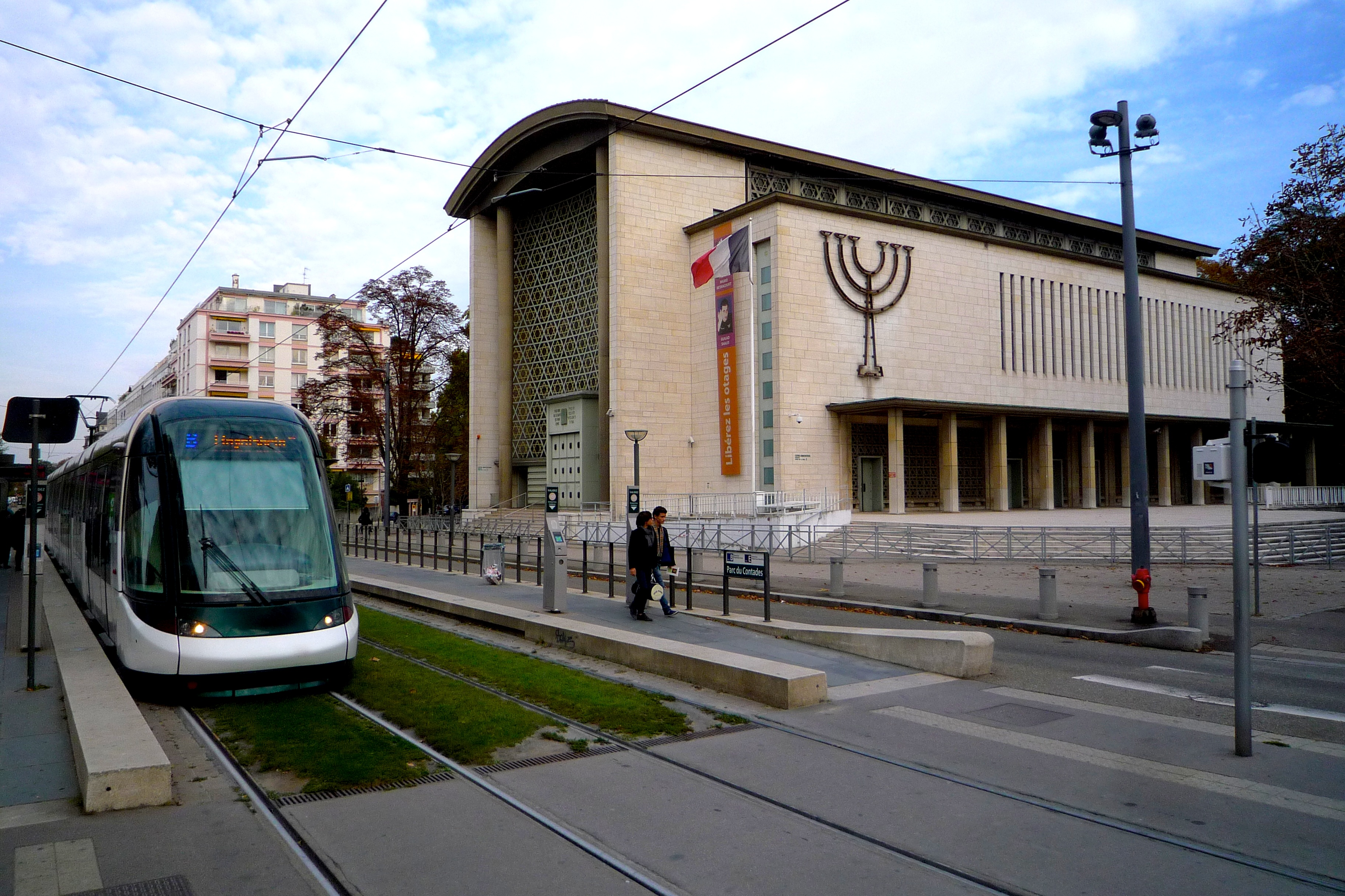 Strasbourg, la grande synagogue de la Paix 2011